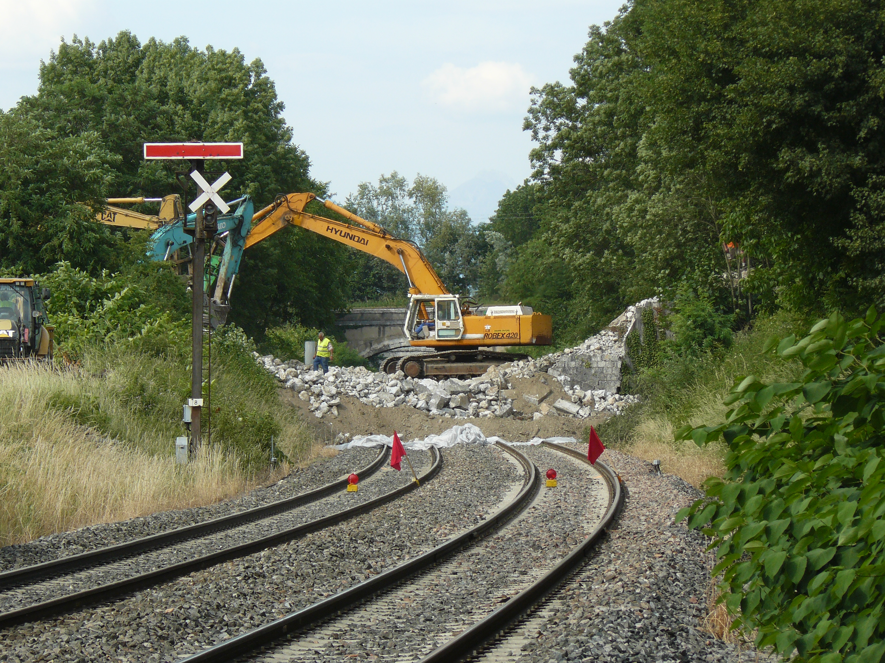 Destruction d'un pont enjambant la ligne ferroviaire Grenoble-Montmelian dans le cadre la modernisation de la ligne.